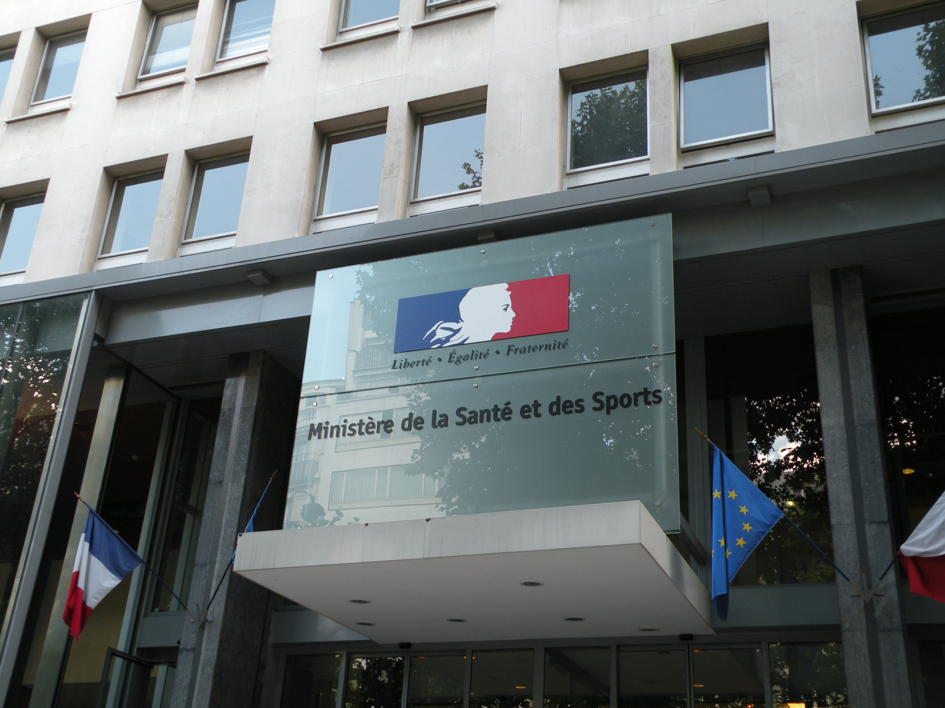 Entrée du Ministère de la Santé et des Sports à Paris, avenue Duquesne.